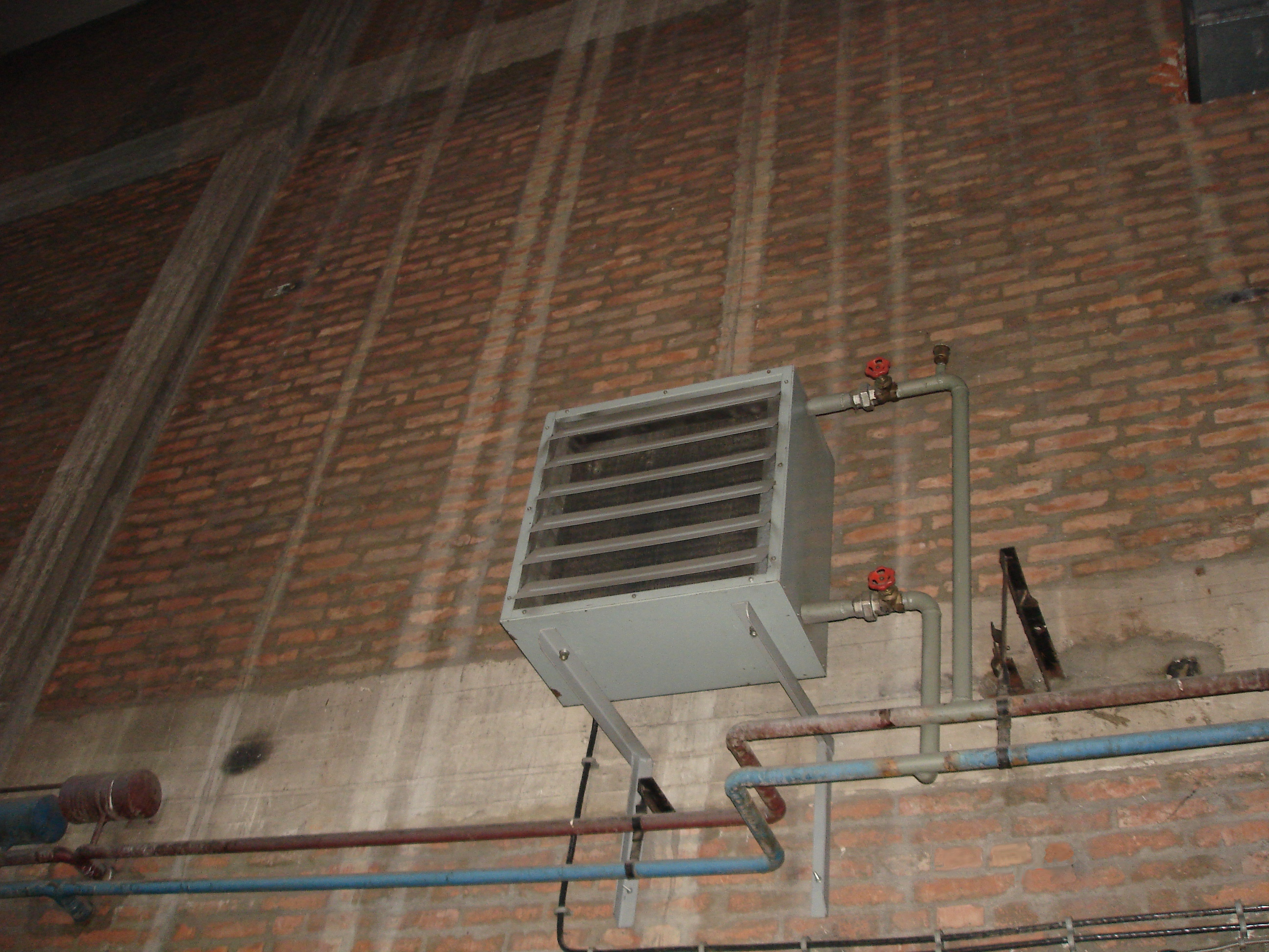 komponenta sustava centralnog grijanja